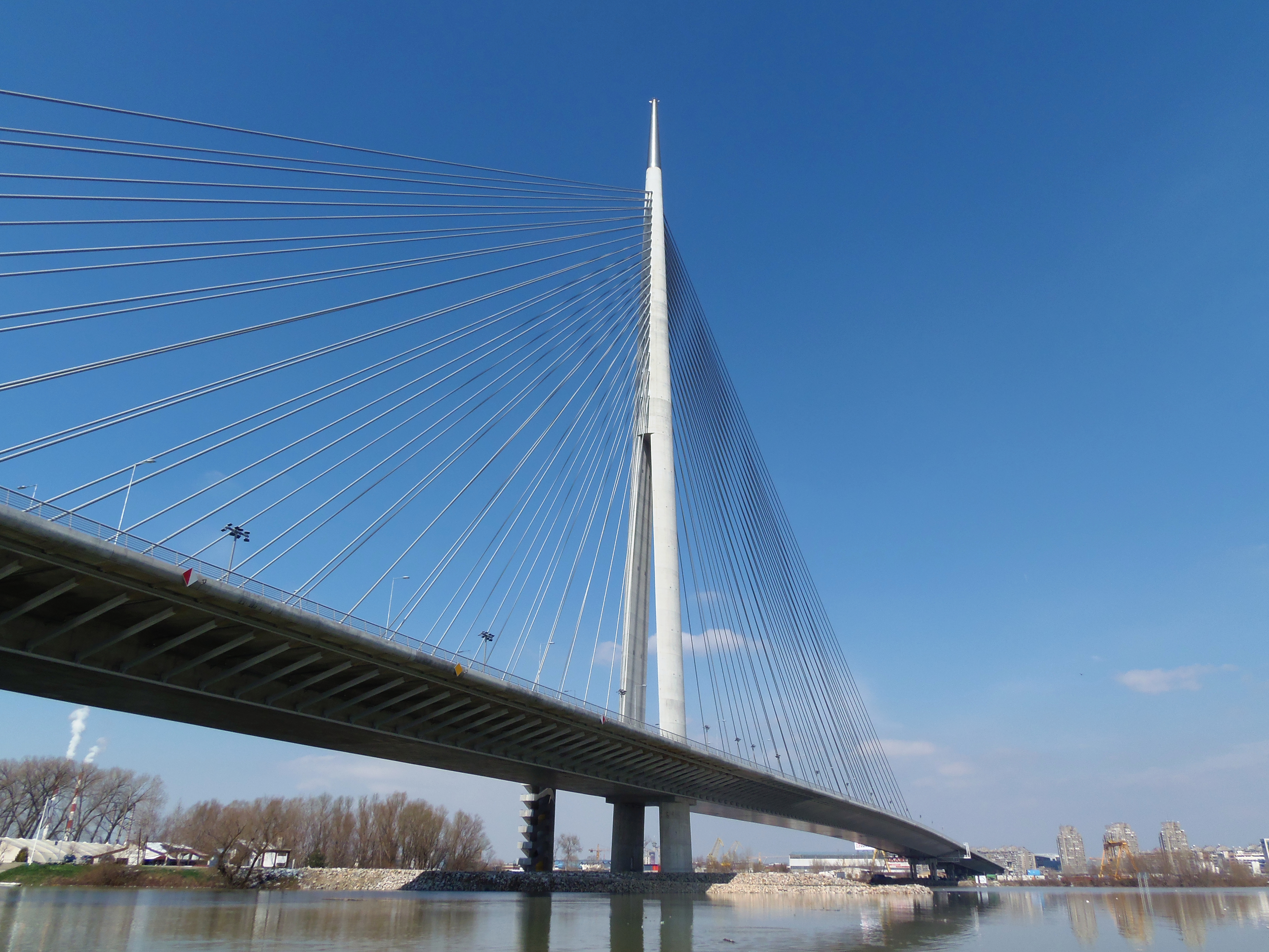 Поглед на мост на Ади.